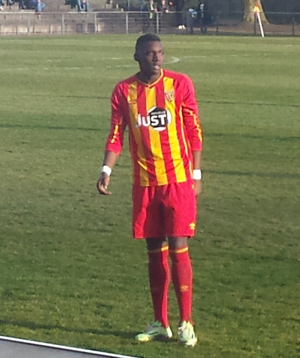 Aristote Madiani lors du match RC Lens / US Ivry, comptant pour la quatorzième journée du championnat de CFA (quatrième division française) - Match en retard -, le 11 mars 2015 au Stade François-Blin d'Avion.